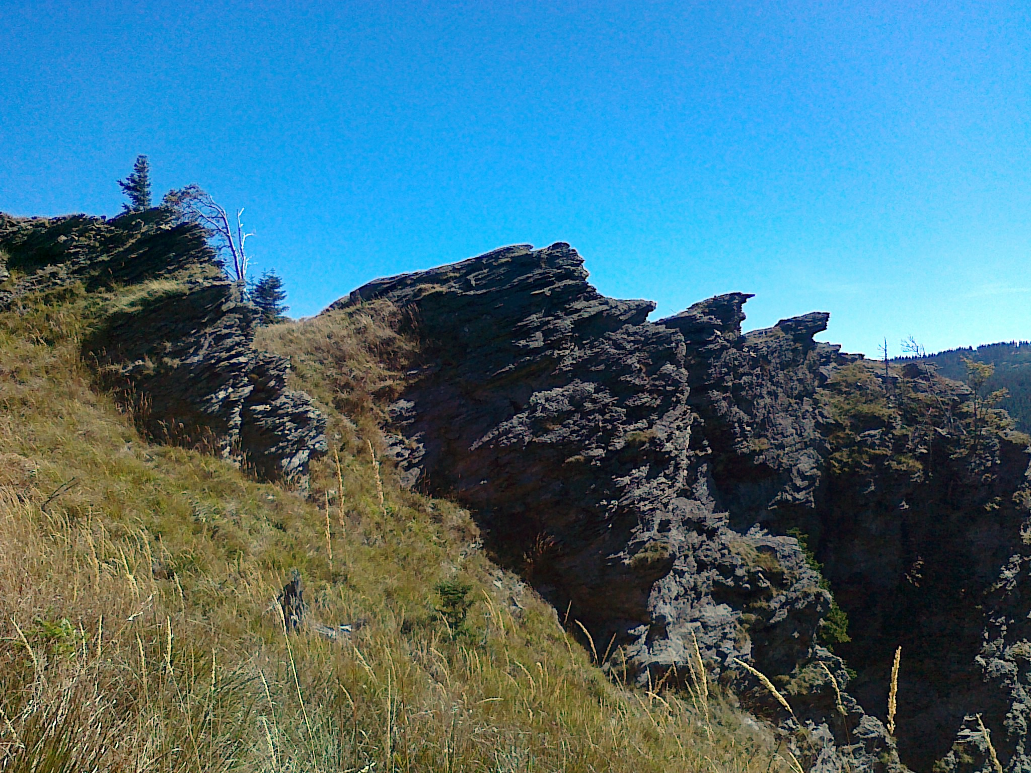 Skalisko Sokolí Skála (1) - 1150 m n.p.m.